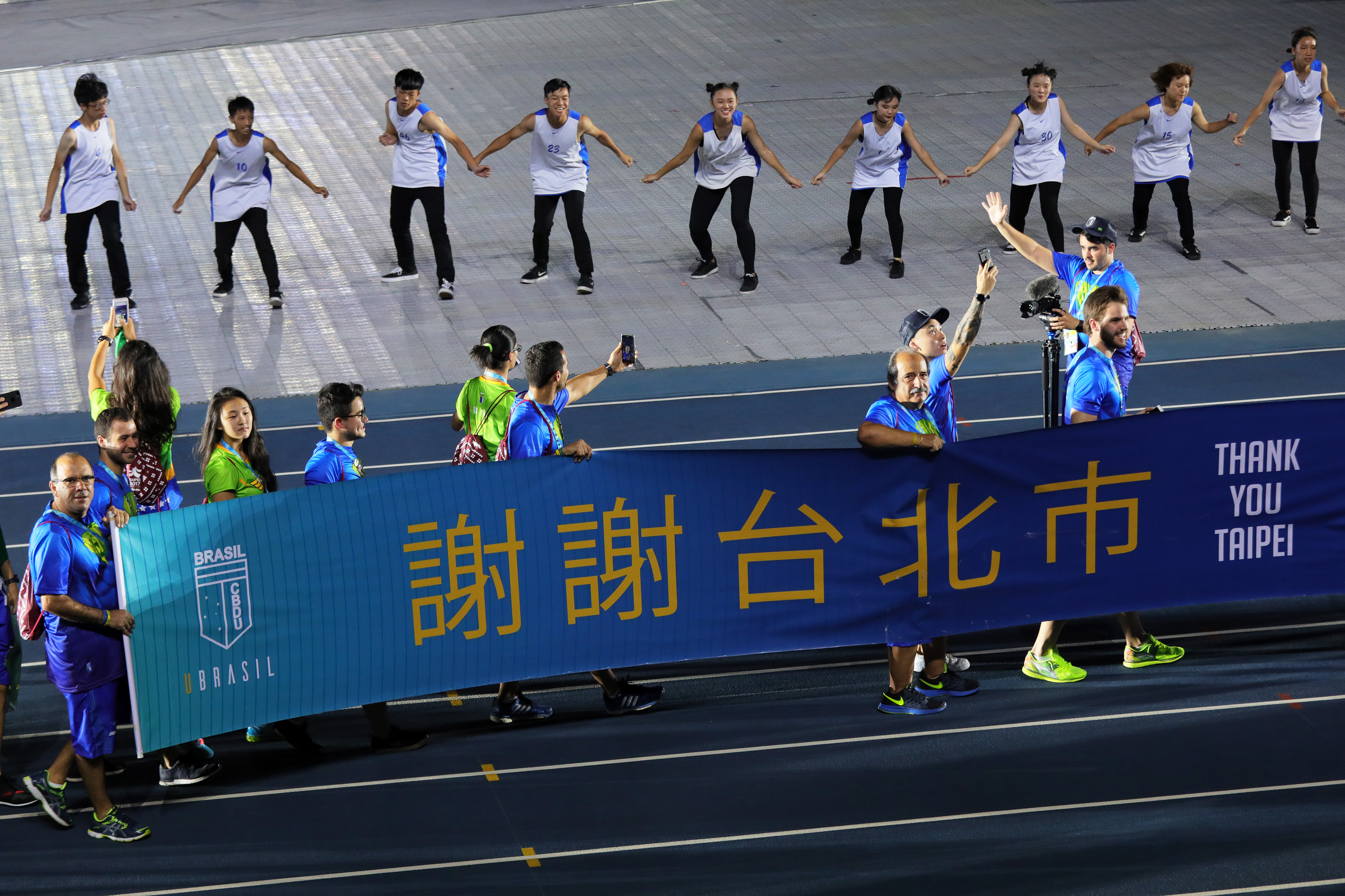 授權方式及範圍：中華民國總統府│政府網站資料開放宣告 Authorization Method & Scope: Office of the President, Republic of China (Taiwan) | Government Website Open Information Announcement